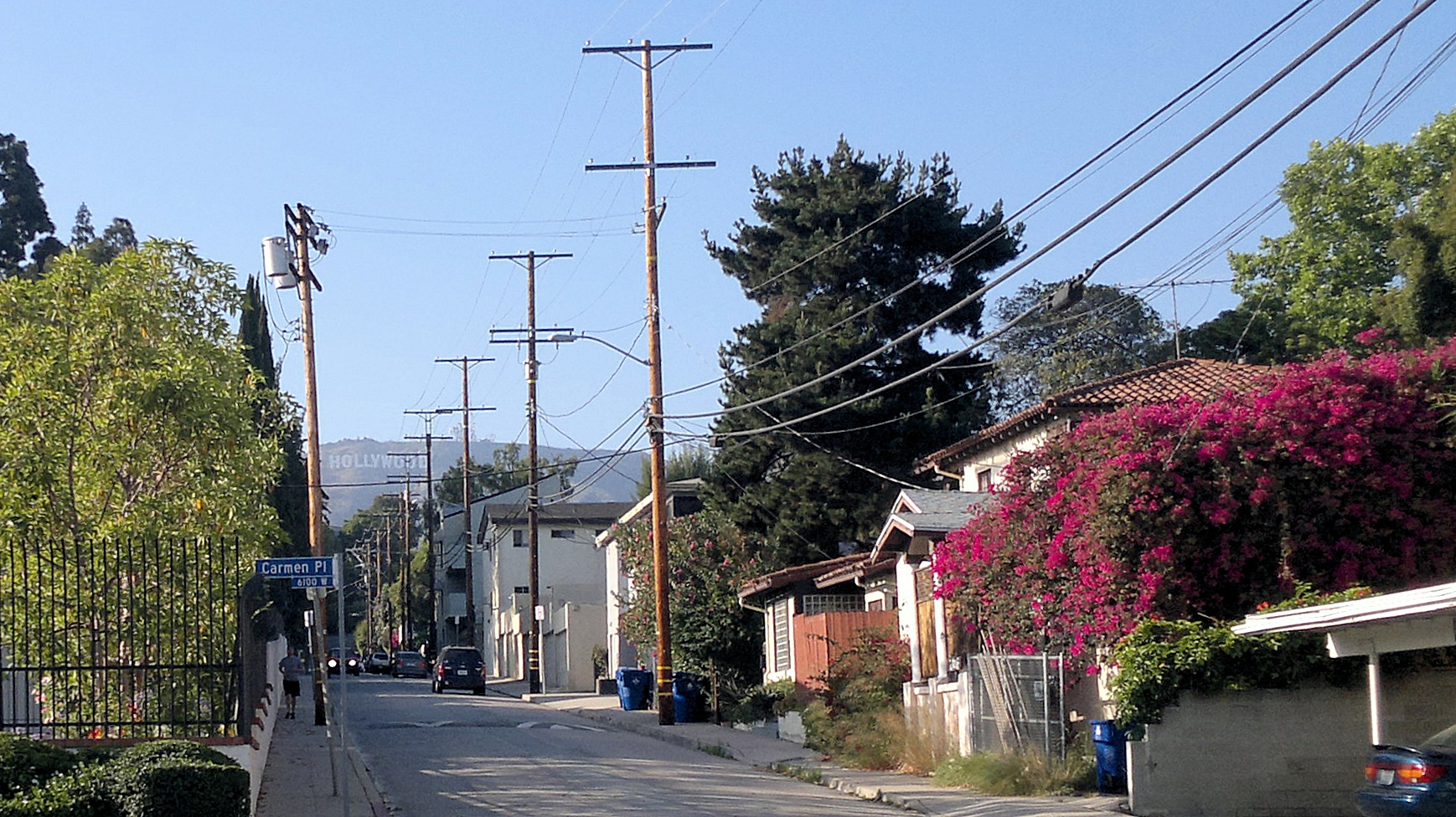 Das Hollywood-Zeichen aus weiter Entfernung.